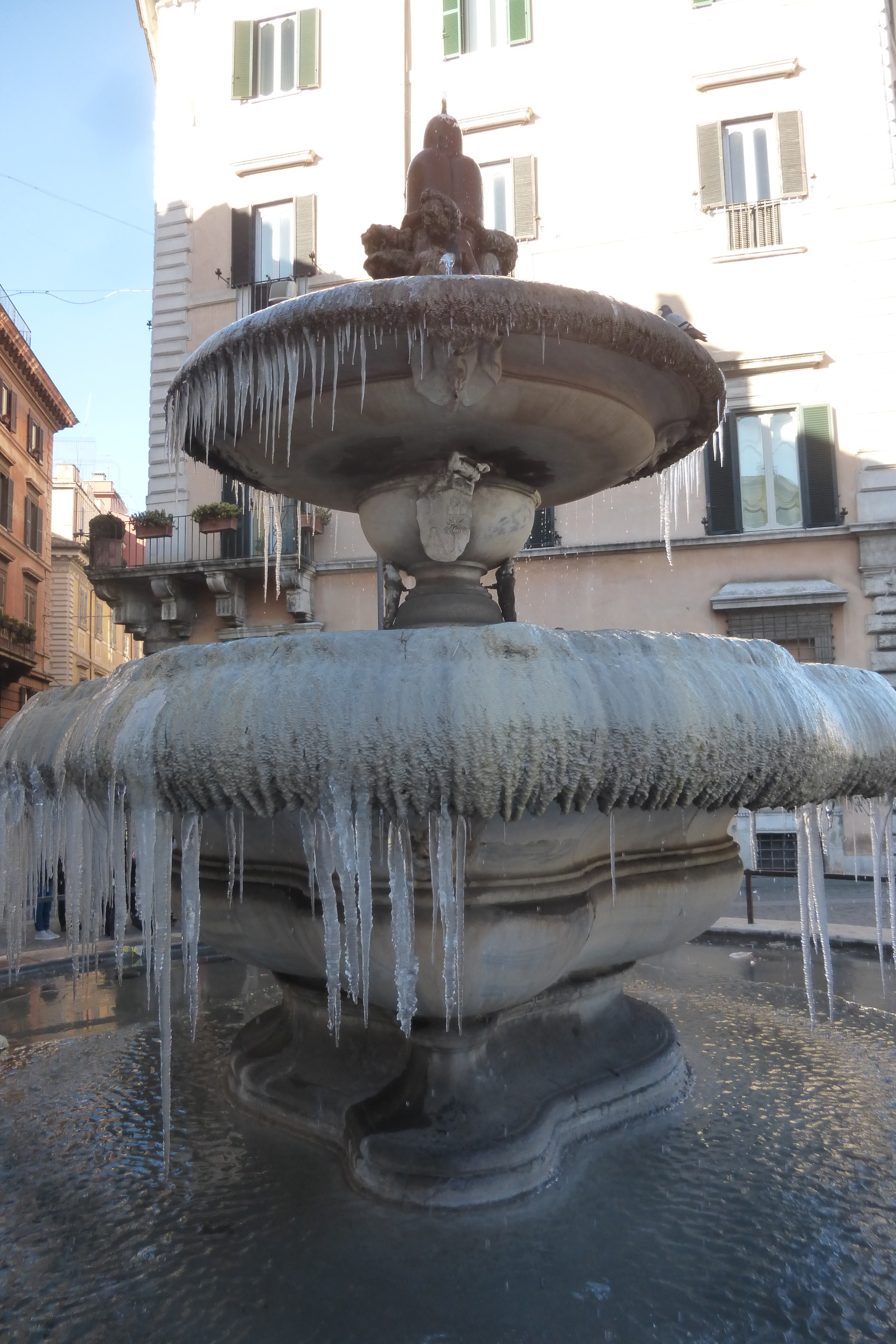 Roma, fontana di piazza d'Aracoeli, ghiacciata.